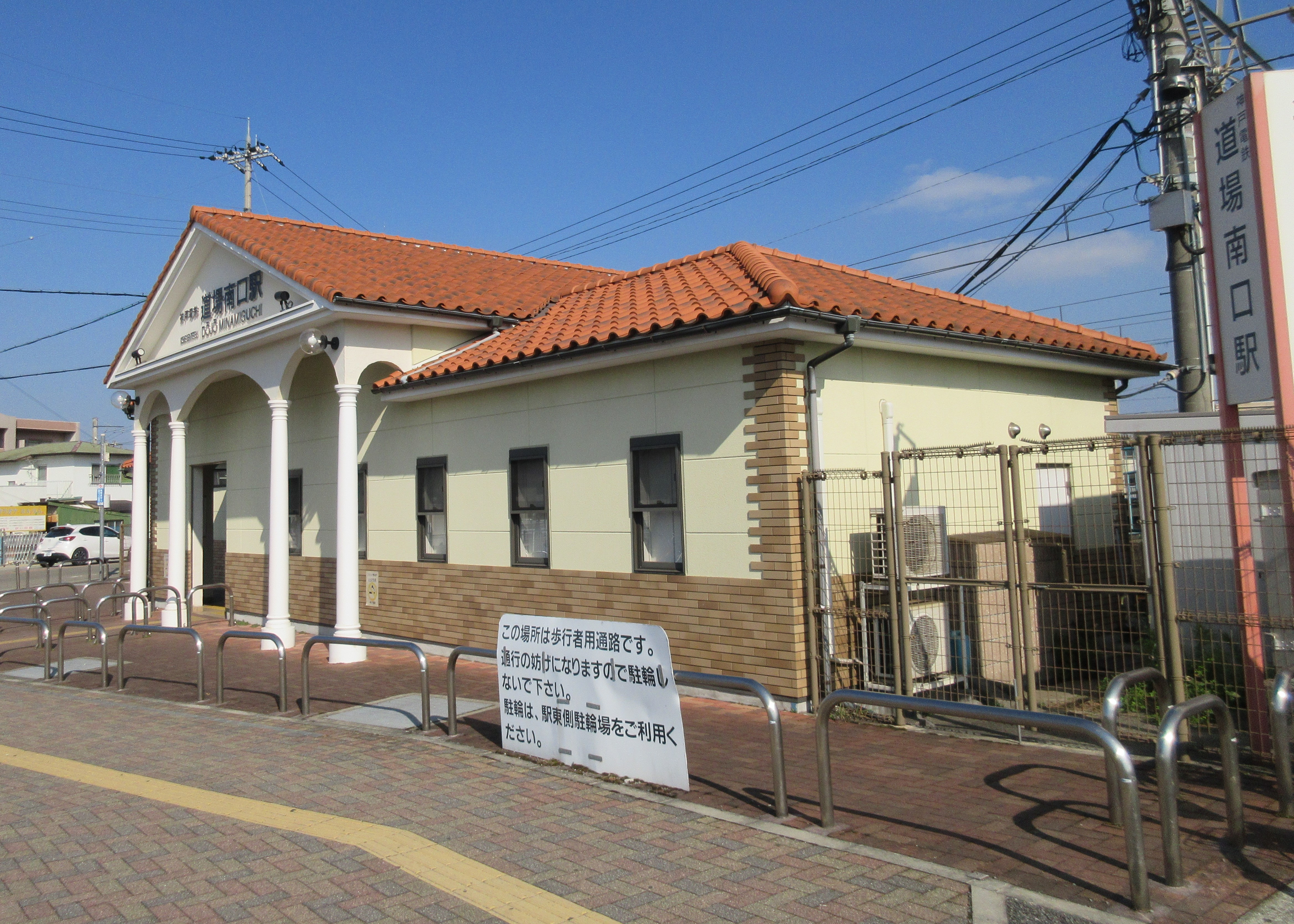 神戸電鉄道場南口駅